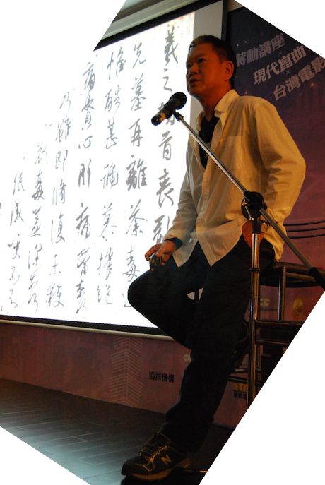 2008第三屆的「台灣月」蔣勳講析東晉王羲之的書法名作—「快雪時晴帖」